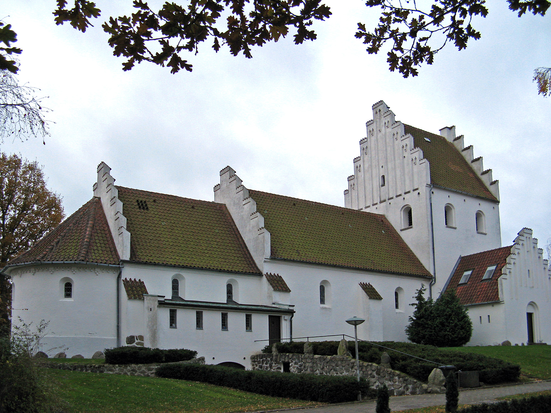 Frederikskirken ligger i Skåde Sogn i Århus Kommune. Kirken blev indviet første søndag i advent 1944